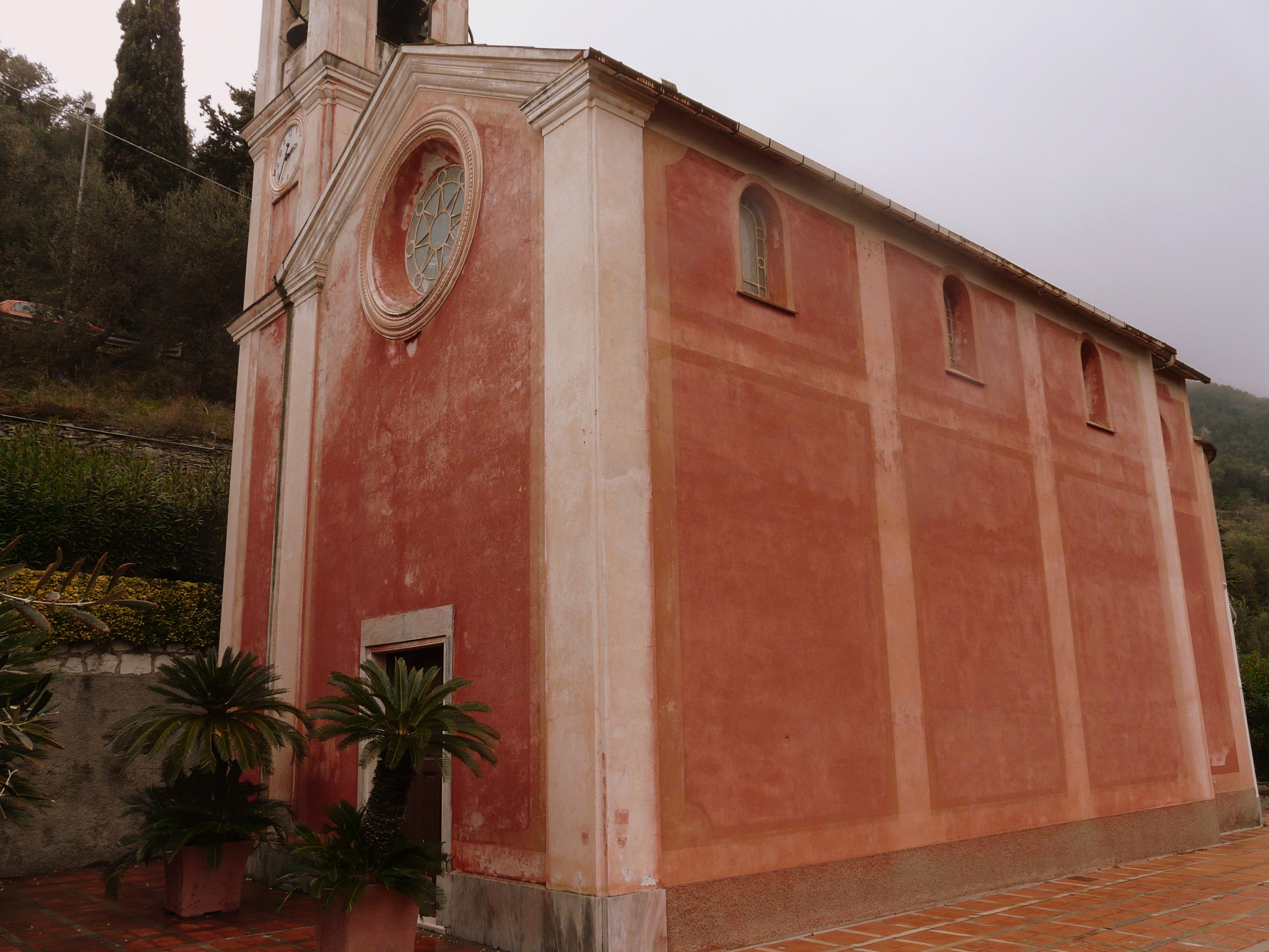 Chiesa di San Pietro, Barassi, Lavagna, Liguria, Italia